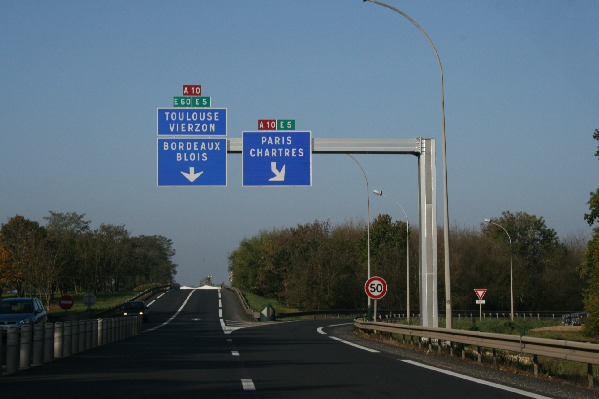 Panneau de signalisation avancée D31c (France)